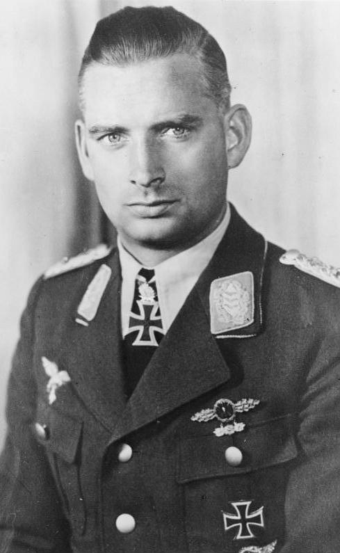 Oberst Hajo Herrmann Träger des Eichenlaubes mit Schwerten zum Ritterkreuz des Eisernen Kreuzes Inspekteur in der deutschen Luftverteidigung. Herausgabe-Datum: 5.2.1944